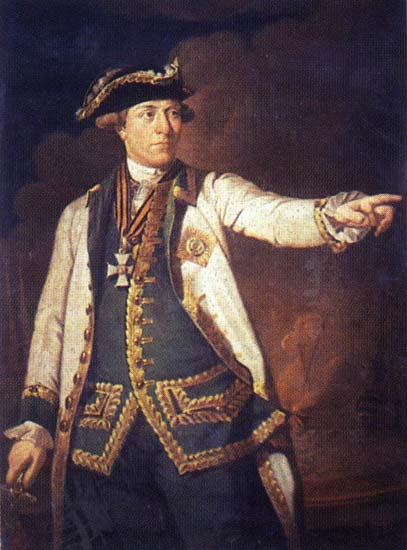 Грейг Самуил Карлович/ ГРМ